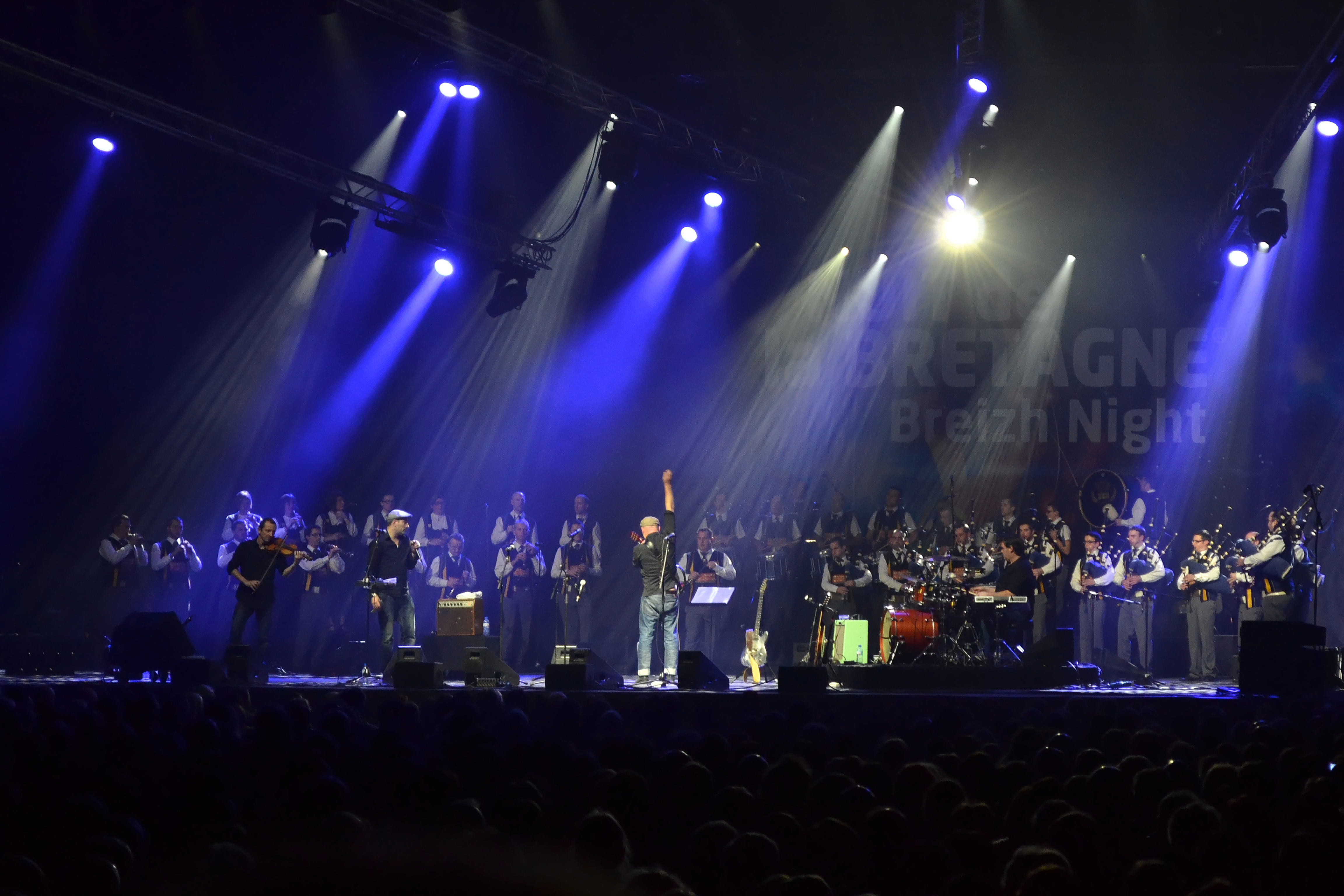 Fest-Rock en concert pour la Nuit de la Bretagne au parc de Langolvas le 11 janvier 2014.